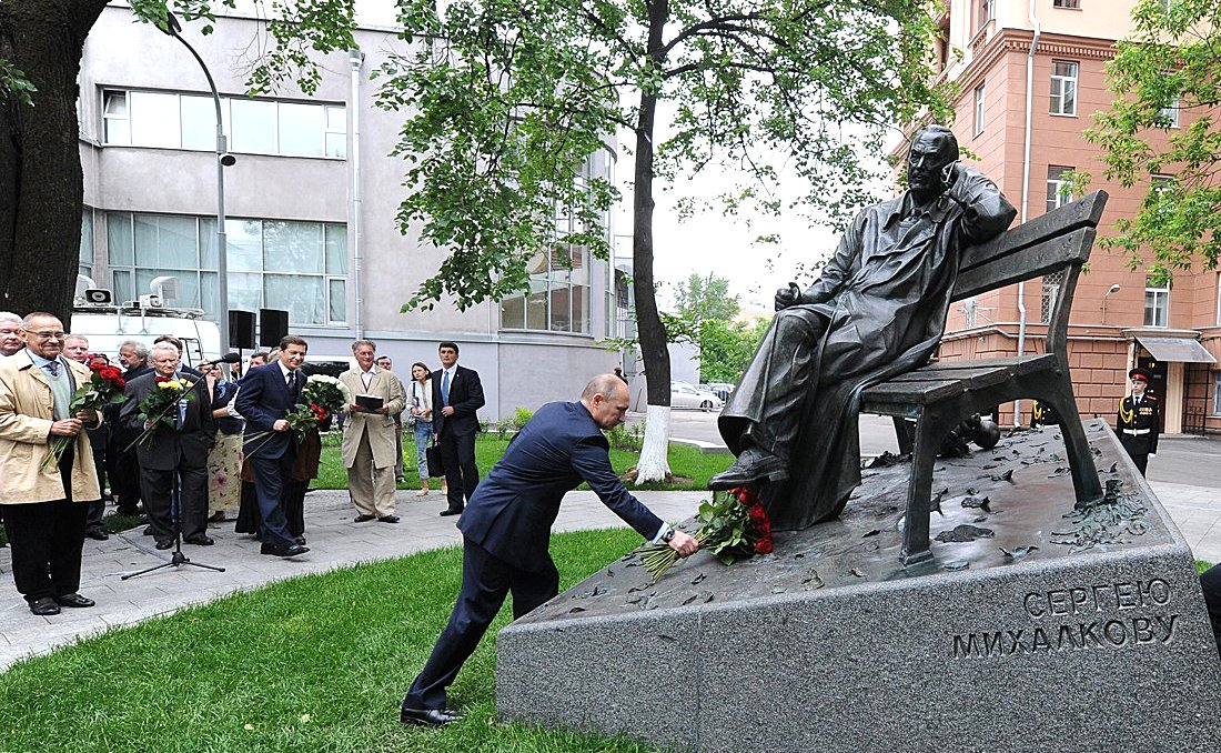 Церемония открытия памятника Сергею Михалкову